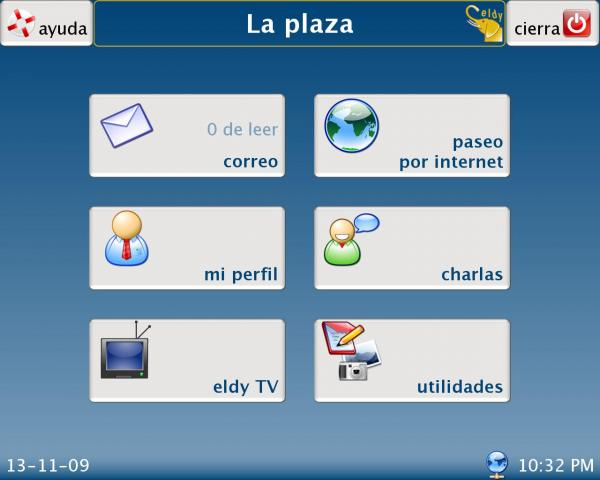 Pantalla principal del programa Eldy, orientado a adultos de la tercera edad.